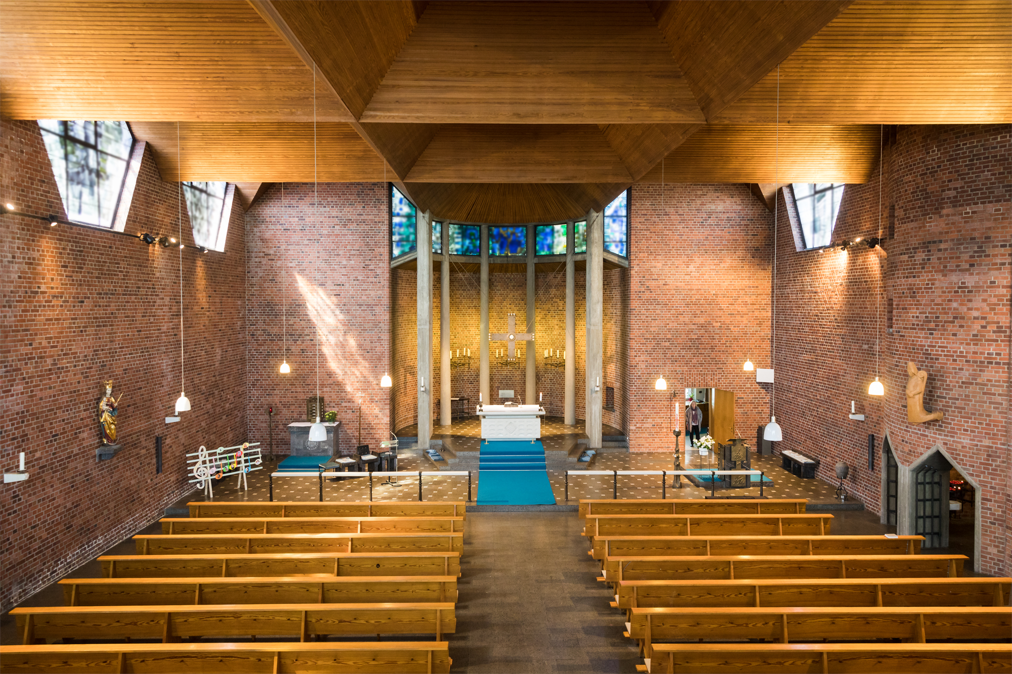 St. Clemens, Köln-Niehl, Architekt: Karl Band (Fenster verpixelt, kann 2083 im Original hochgeladen werden)